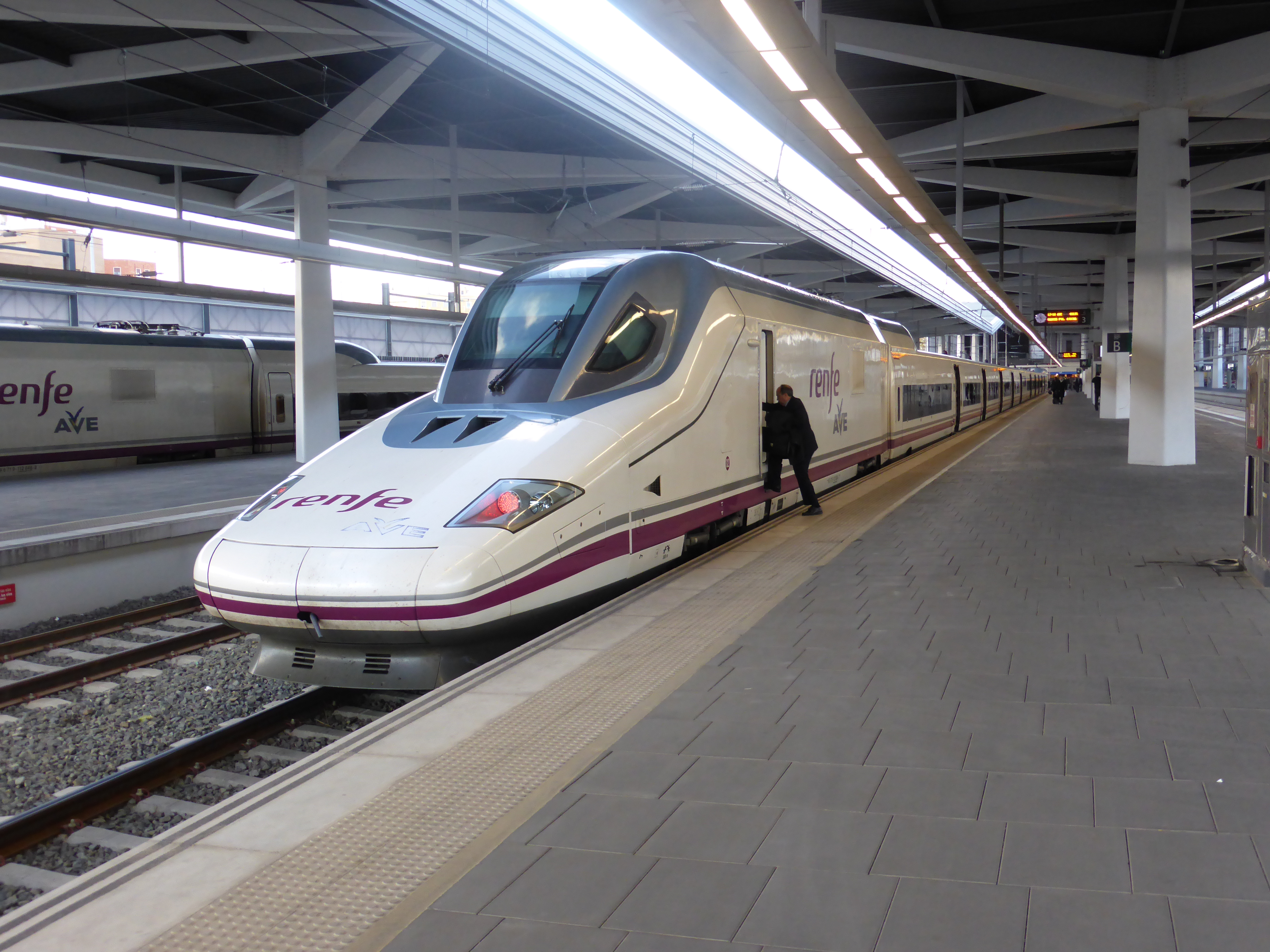 En la estación de Valencia (Joaquín Sorolla), para trenes de alta velocidad, se encuentra estacionado el tren de la línea Valencia-Madrid. La locomotora es conocida como "Pato", de Bombardier. La rama es Talgo 350, formando parte de la Serie 112 de Renfe (Renfe Operadora).